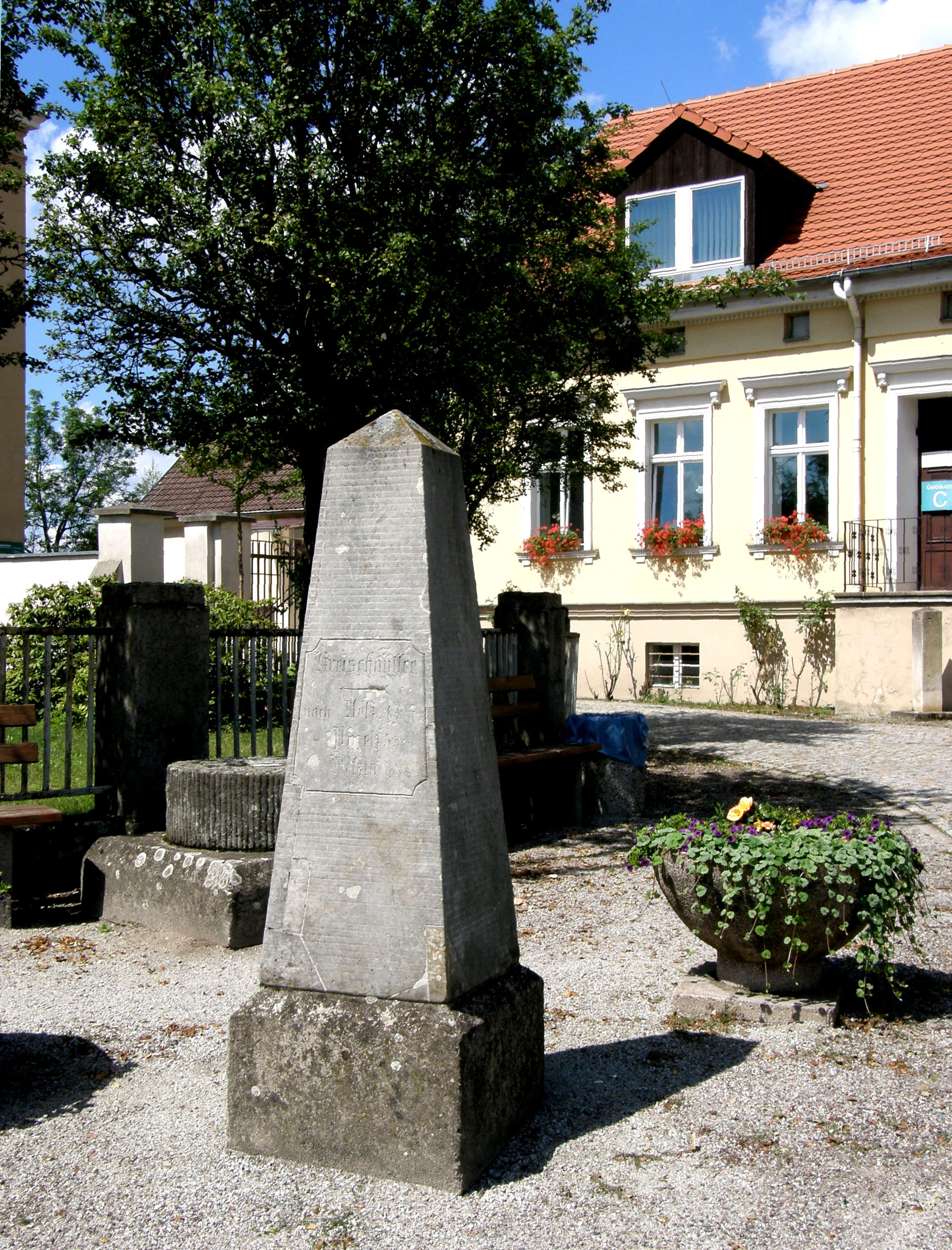 Falkensee, Falkenhagener Str., histor. Meilenstein vor Rathaus